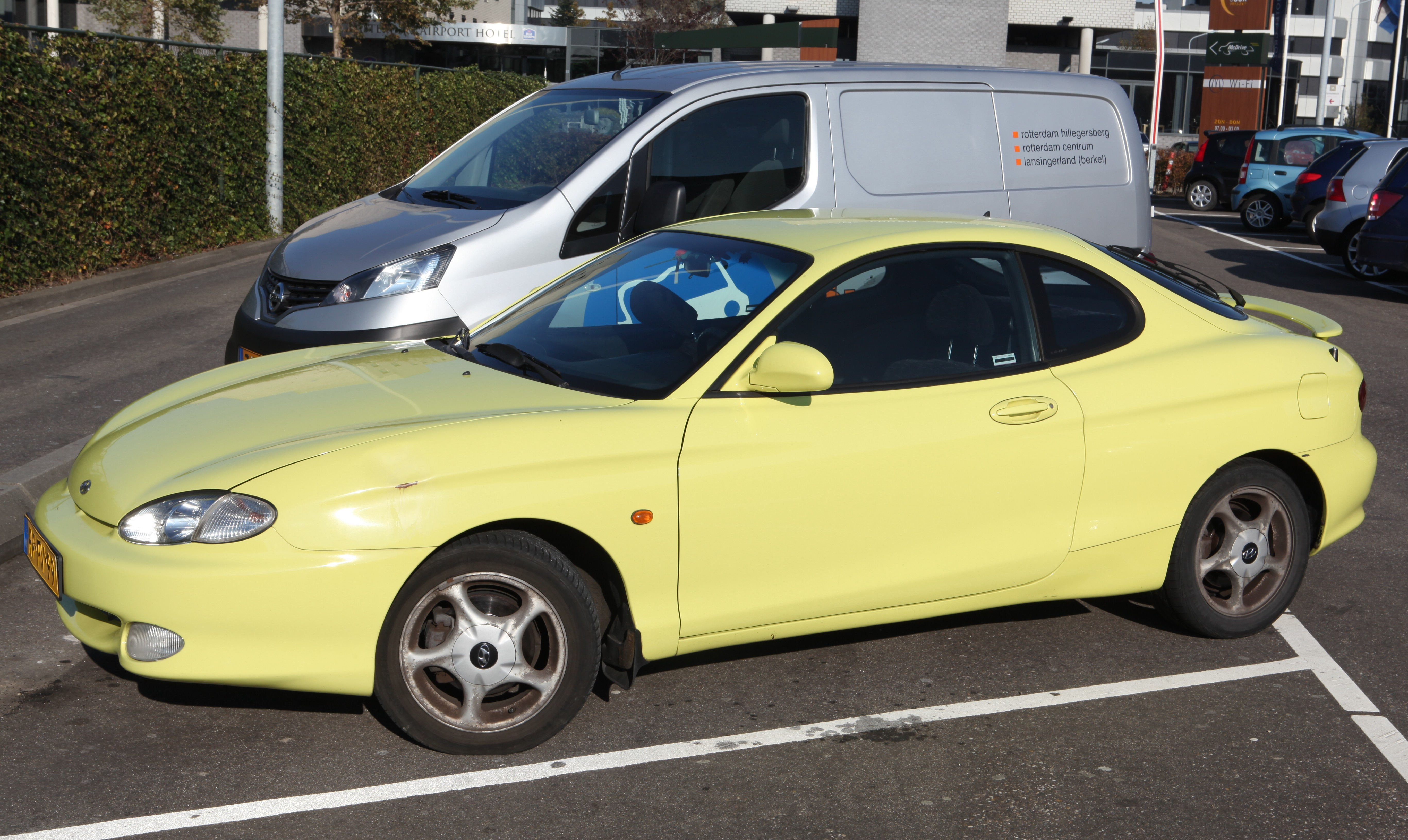 1997 Hyundai Coupe